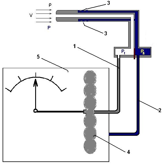 Shema brzinomjera